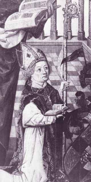 Hermann von Hessen, (* um 1450; † 19. Oktober 1508) war von 1480 bis 1508 als Hermann IV. ("der Friedsame") Erzbischof von Köln, ab 1498 auch als Hermann I. Fürstbischof des Fürstbistums Paderborn. Tafelbild des Kölner Meisters des Marienlebens heute im Rheinischen Landesmuseum.Der Bildausschnitt zeigt den Bischof in Pontifikalkleidung knieend unter dem Schutz des Kölner Patrons St. Petrus. Die linke Hand des hl. Petrus mit einem Buch über seiner Mitra ist links oben zu sehen.